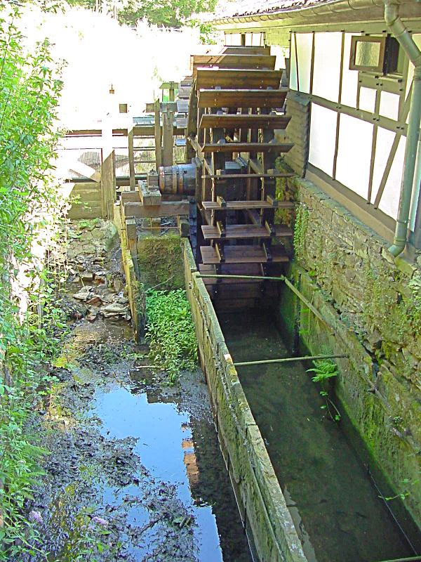 unterschlächtiges Wasserrad am Balkhauser Kotten in Solingen